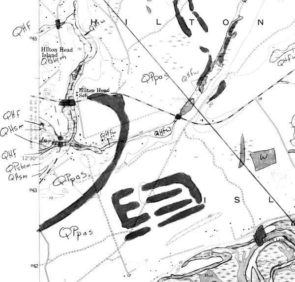 geological field map